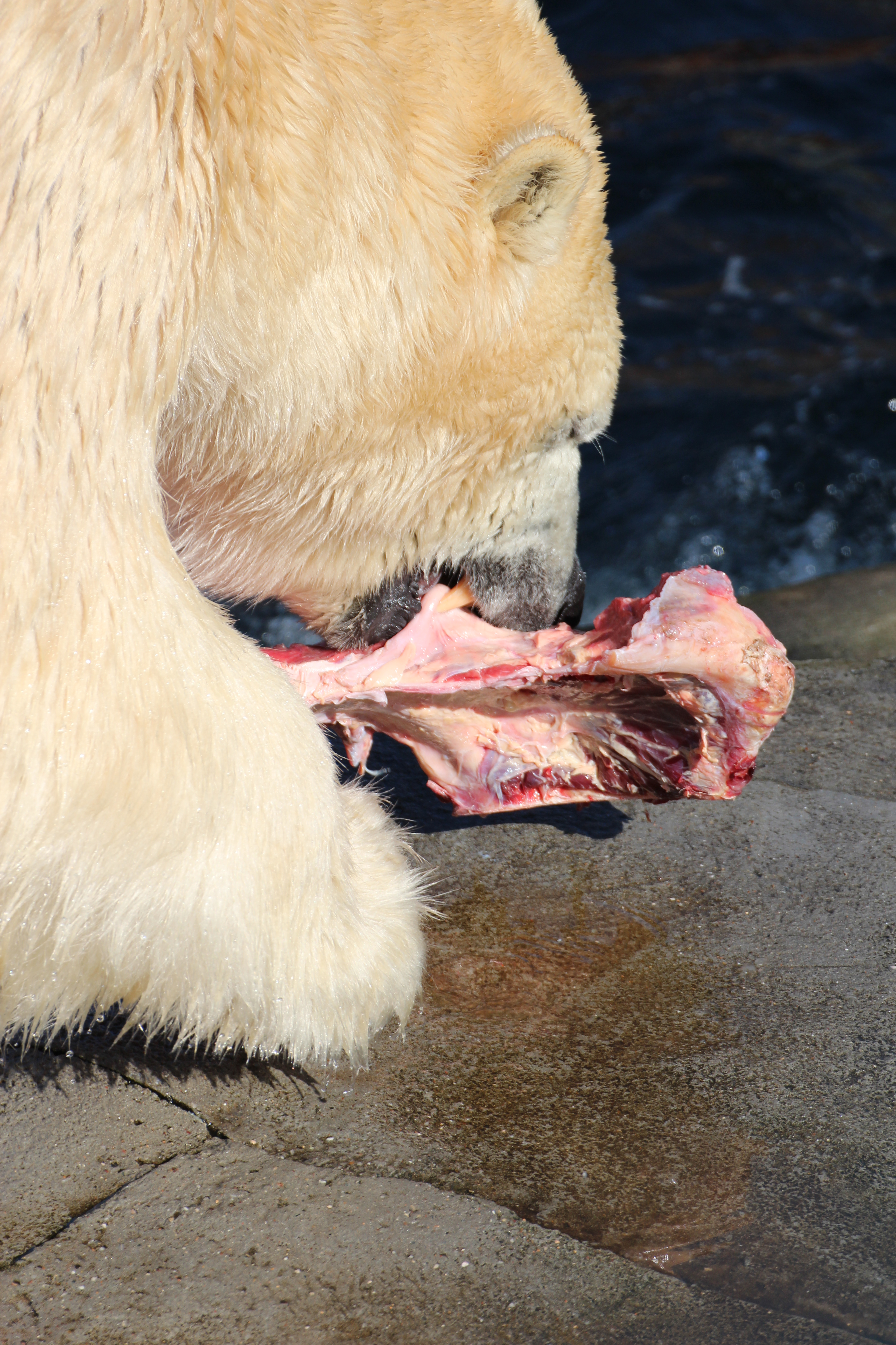 Fressender Eisbär (Ursus maritimus) im Zoo Hannover